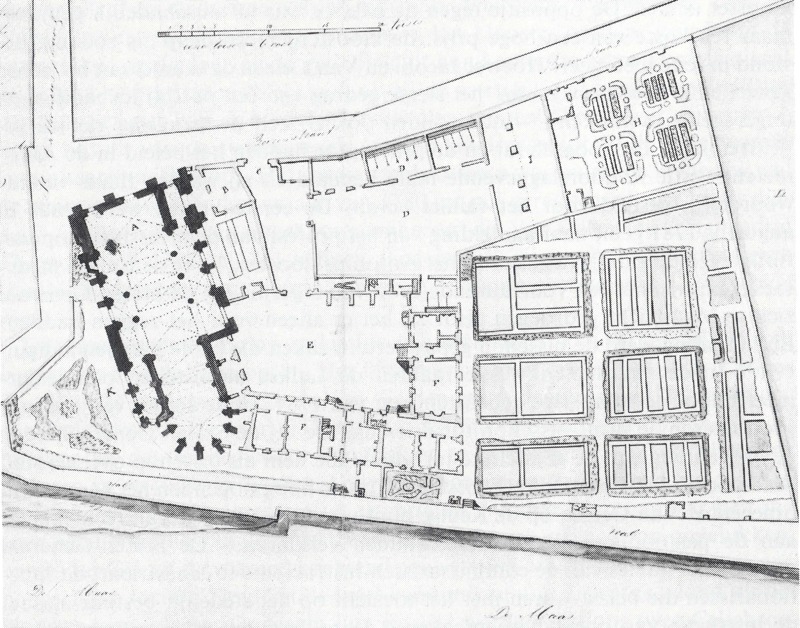 Plattegrond van het Antonietenklooster in Maastricht zoals het er rond 1790 uitzag, getekend circa 50 jaar later door Van der noordaa. De kerk was bij de Franse belegeringen van 1794 en 1794 zwaar beschadigd geraakt. Het complex werd gesloopt voor de aanleg van het Kanaal Luik-Maastricht in 1850. Collectie Gemeente Archief Maastricht, RHCL.